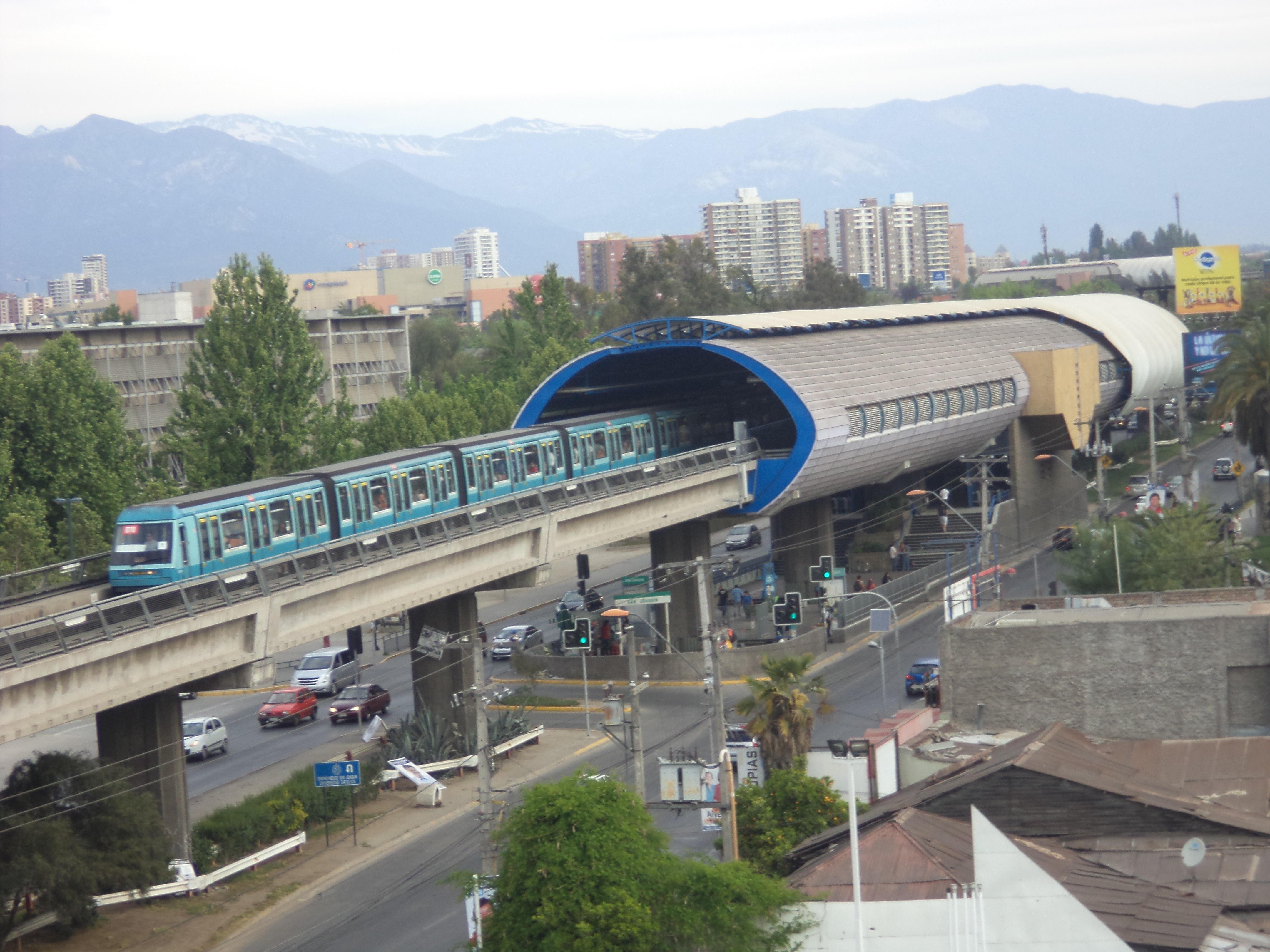 Fotografía panoràmica del Metro San Joaquín tomada desde el Instituto Aiep.